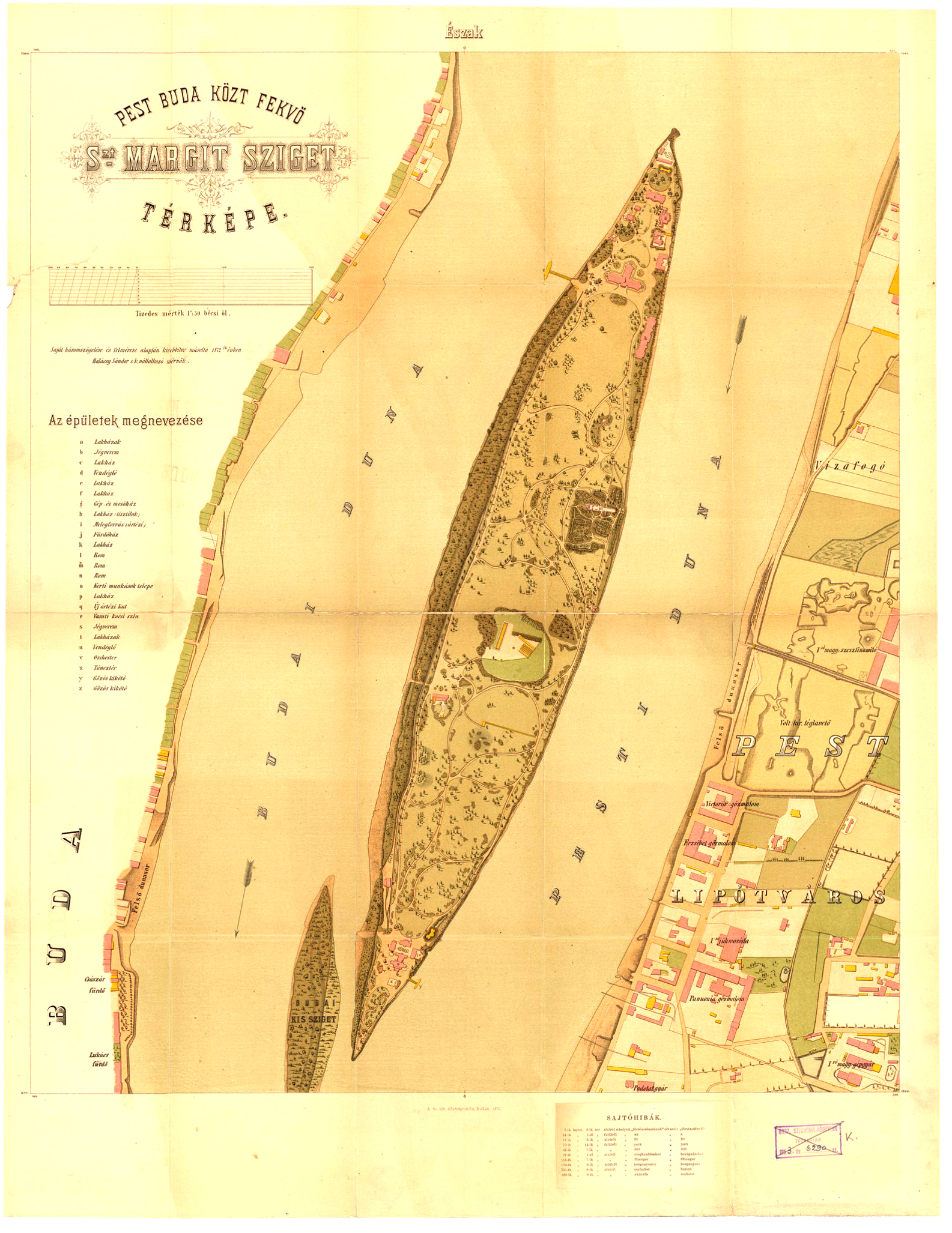 Pest Buda közt fekvő Szt Margit sziget térképe. A szigeten lévő épületek alaprajzban, betűvel, kereten belül betű magyarázatban saját háromszögelése és felmérése alapján kisebbítve másolta Halácsy Sándor